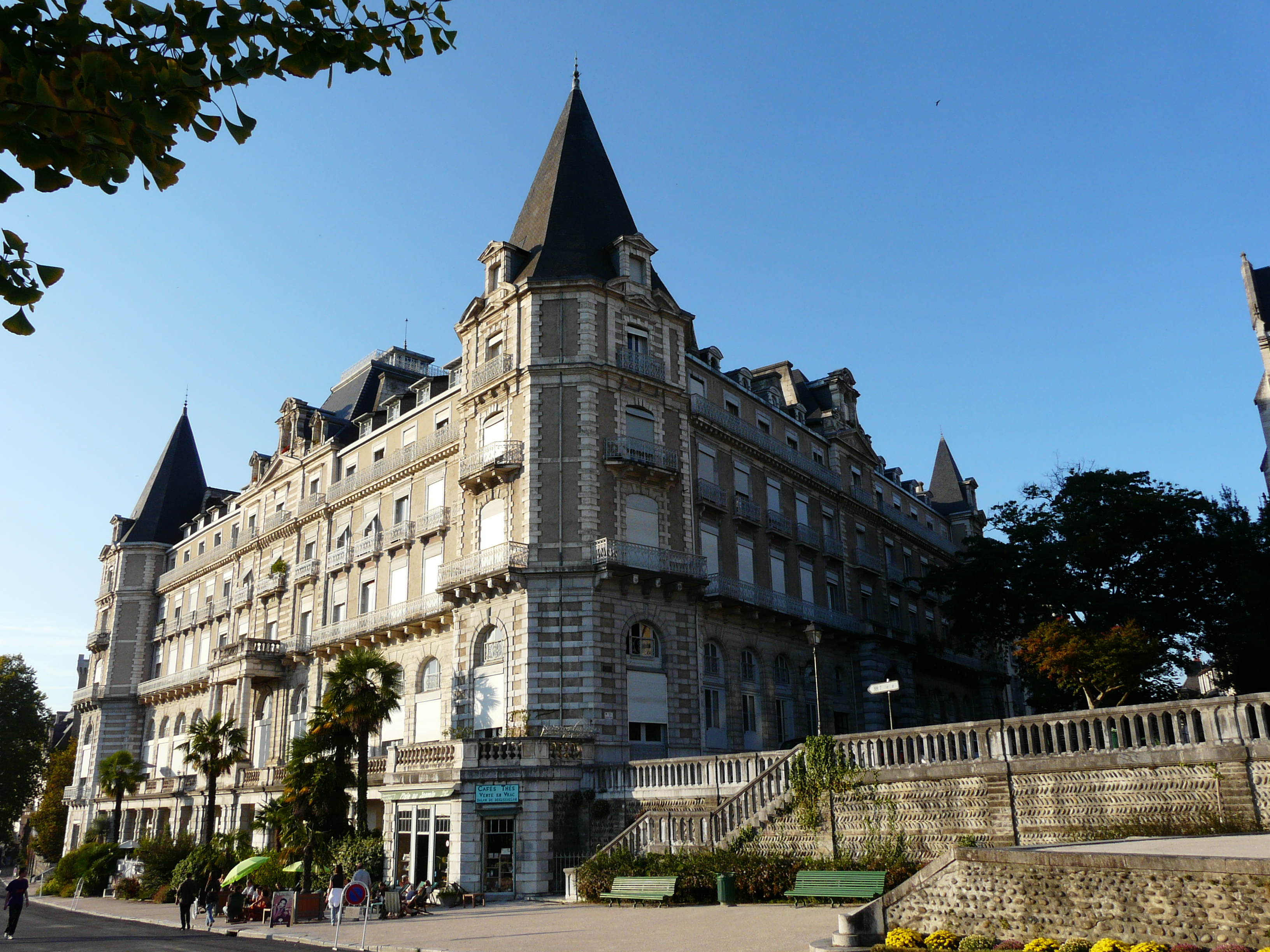 L'ancien hôtel de Gassion, à l'angle du boulevard des Pyrénées et de la rue Gontaut-Biron, Pau, Pyrénées-Atlantiques, France.